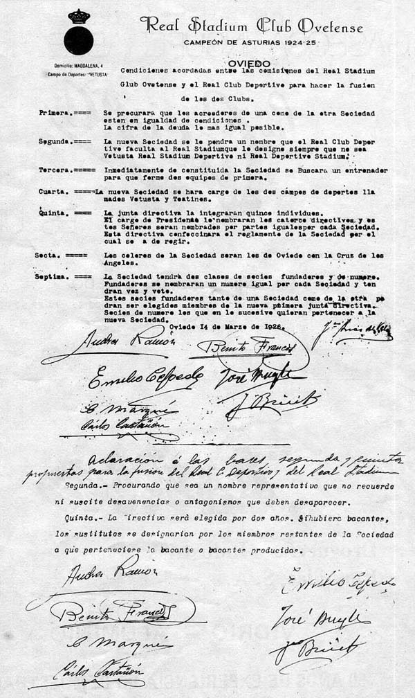 Acta fundacional del Real Oviedo en 1926